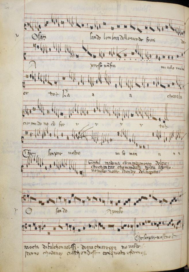 BL 29987